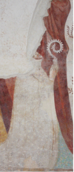 La Badessa Agnese D'Arpo nel ciclo di affreschi di Filippo da Firenze - Abbazia di Santa Maria di Mogliano Veneto